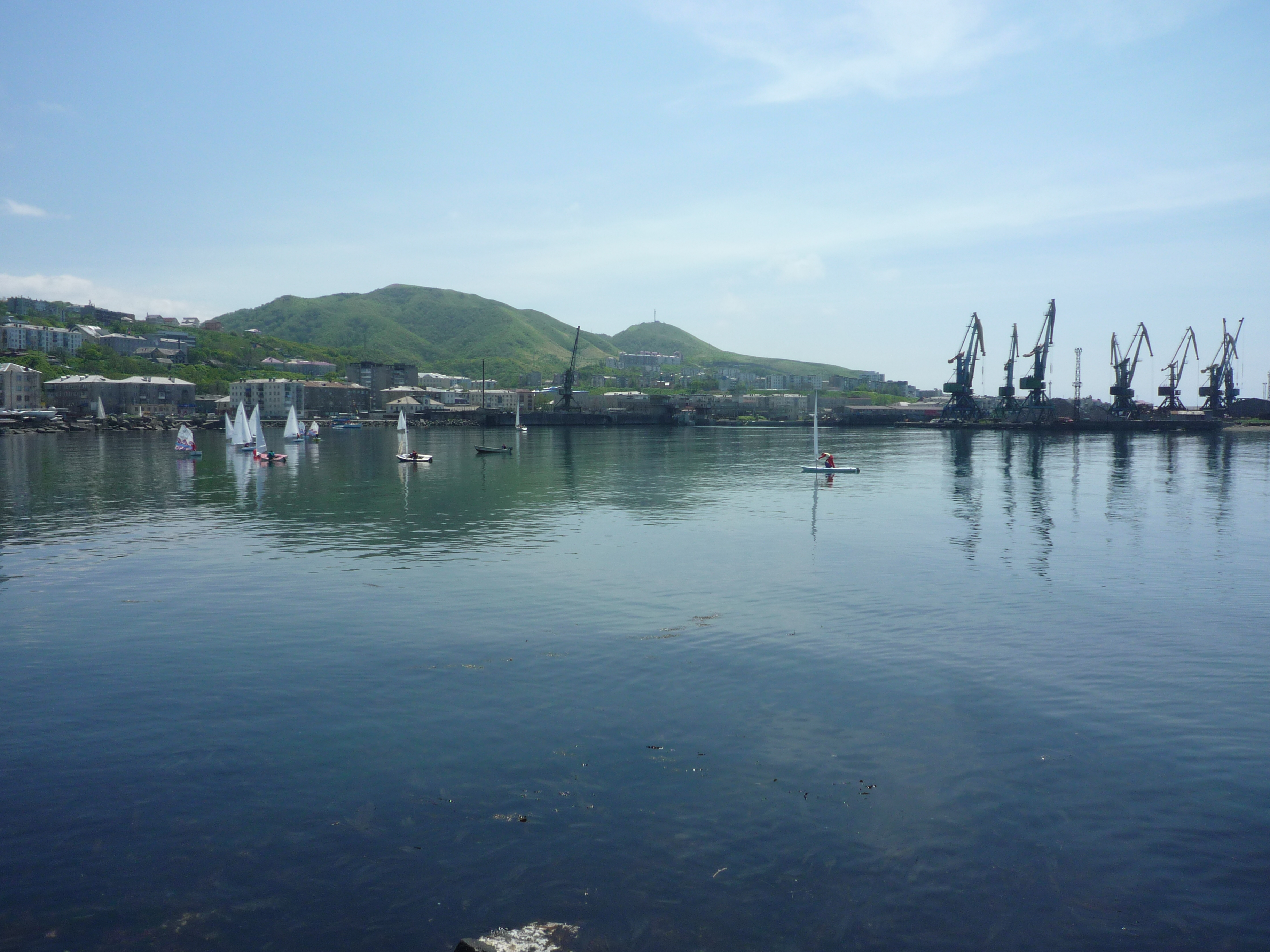 Гавань торгового порта Холмска